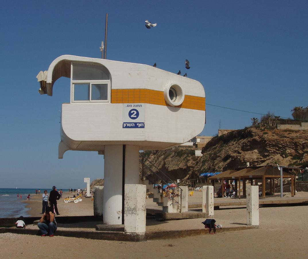 סוכת המציל, חוף השרון, הרצליה. צילם דוד שי